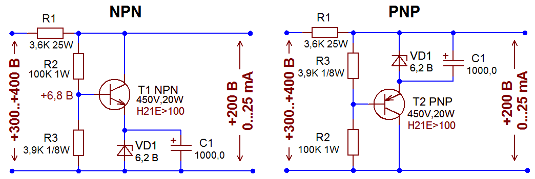 Стабилитронный шунт на выходное напряжение 200В, ток до 25 мА, с умножением напряжения низковольтного стабилитрона - две альтернативные топологии. Внимание! При мгновенной подаче напряжения +400В мощность рассеяния на R1 составит около 50 Вт. Указанная мощность в 25 Вт - компромисс, уместный в схемах с кенотронным выпрямлением. Подробно см.